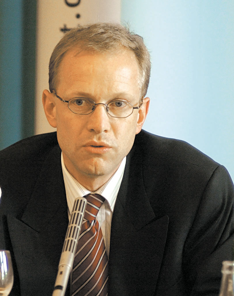 Personenfoto von Michael Eilfort